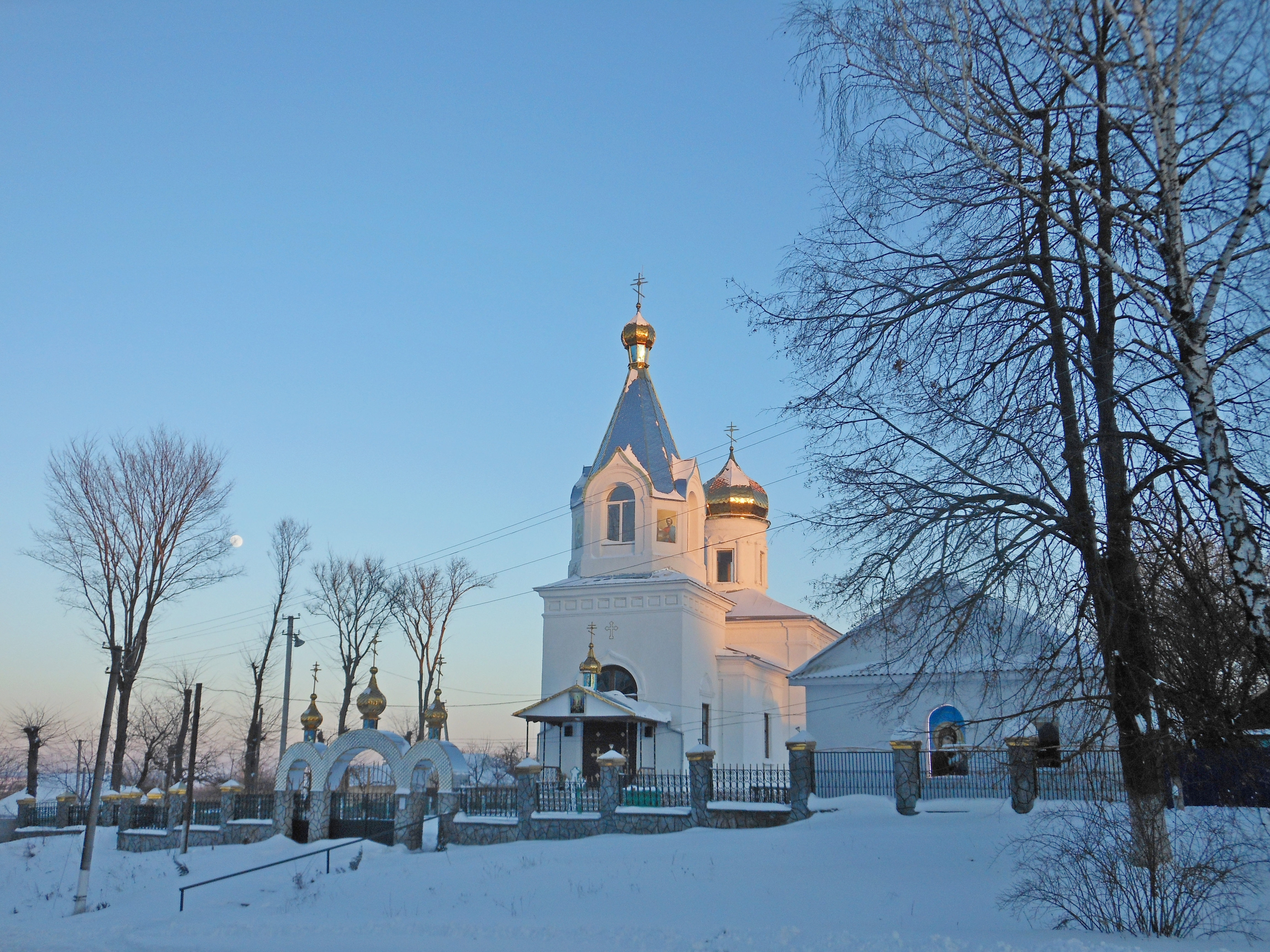 Церква, Балки